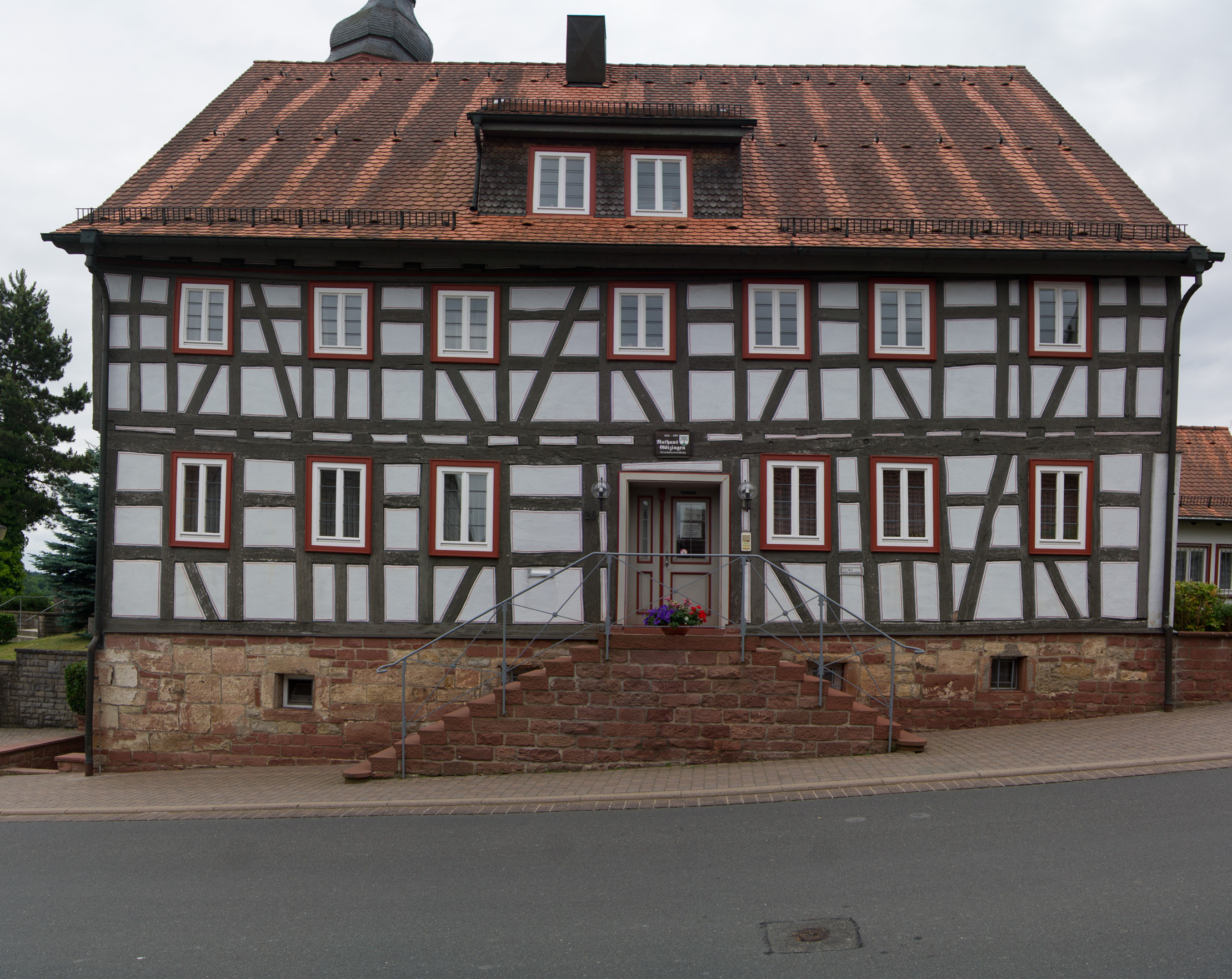 Die Straßenseite des Götzinger Rathauses